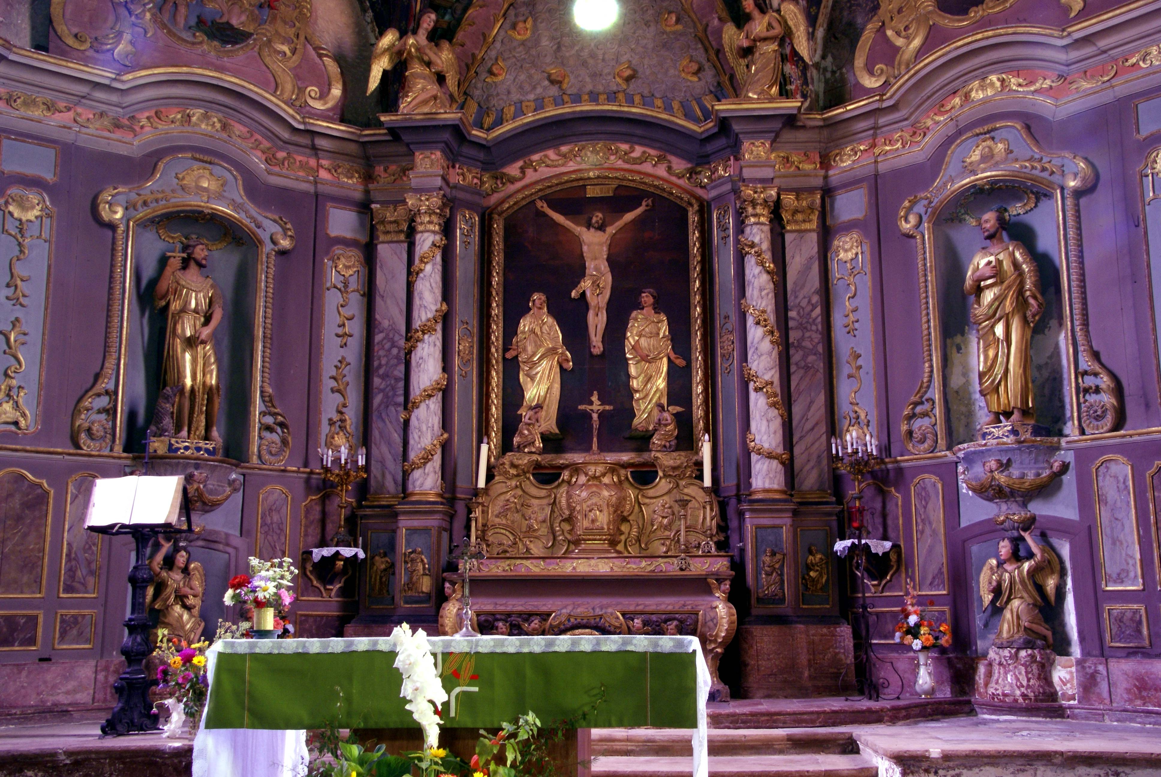 Le choeur de l'Eglise Saint-Jean-Baptiste